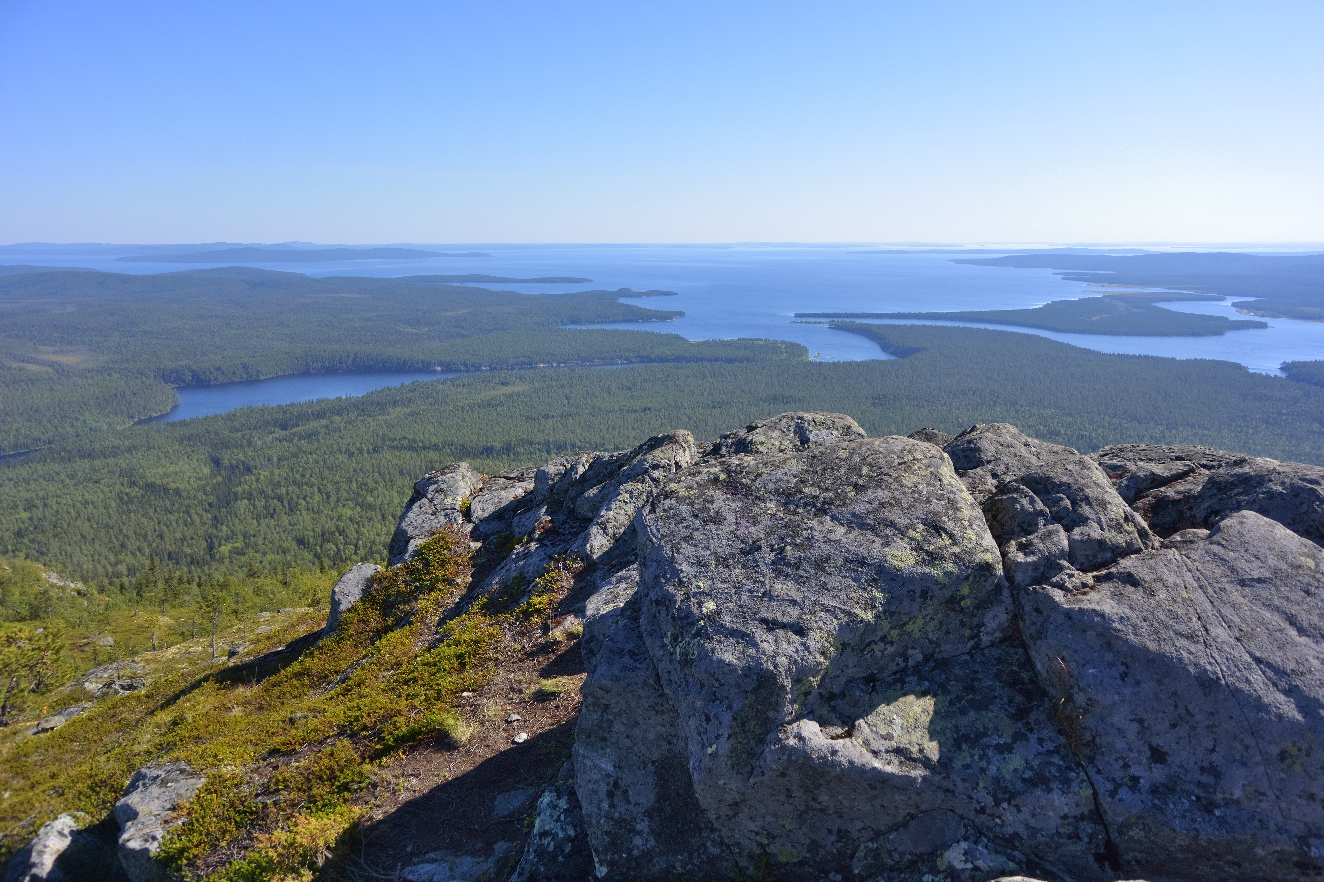 Паанаярви: Западная граница национального парка совпадает с государственной границей России с Финляндией. Со стороны финской границы к “Паанаярви” примыкает национальный парк “Оуланка”,Лоухский район, This image is related to the protected area of Russia number 1000069